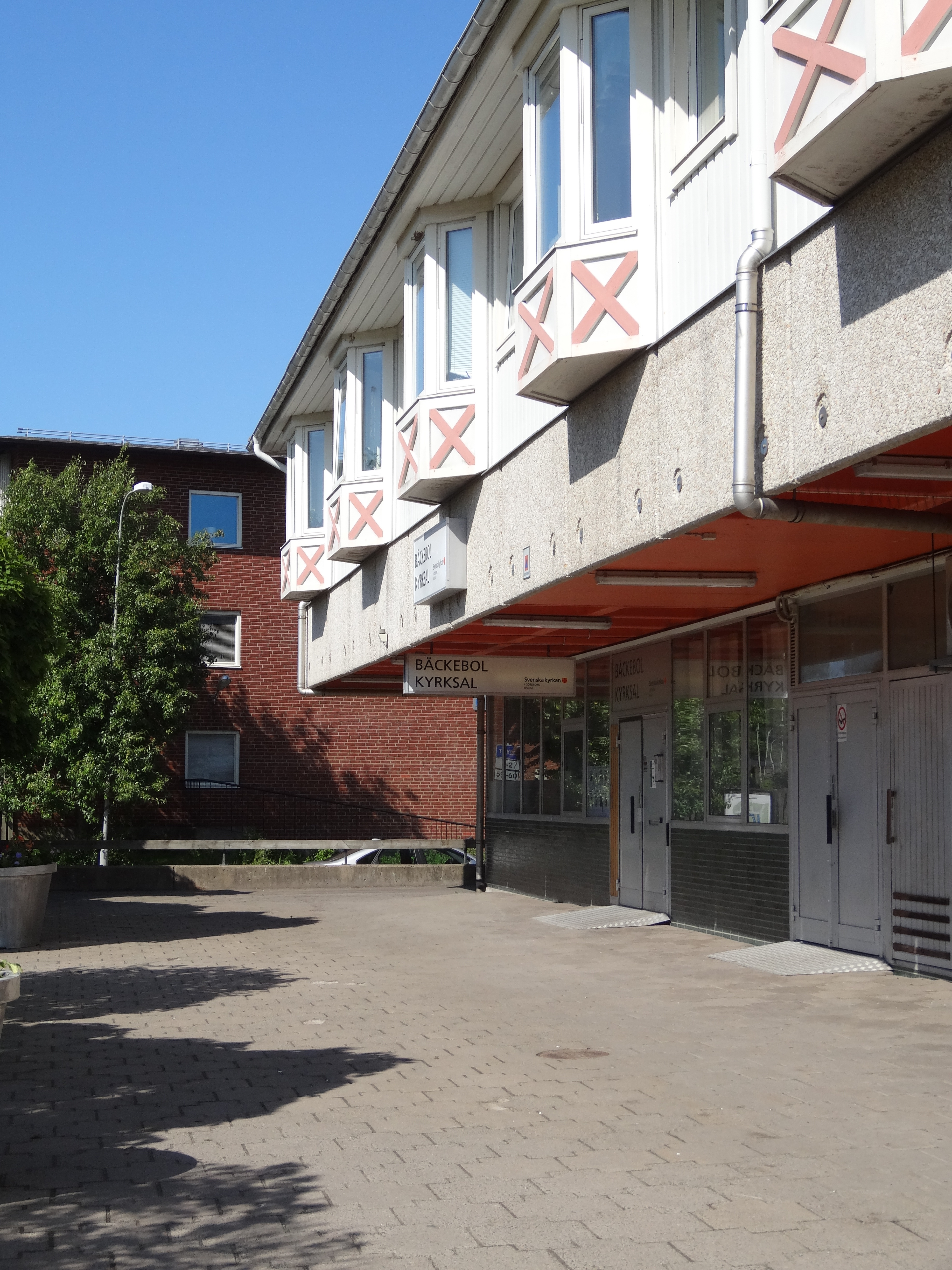 Bäckebols kyrksal på Selma Lagerlöfs torg i Göteborg.